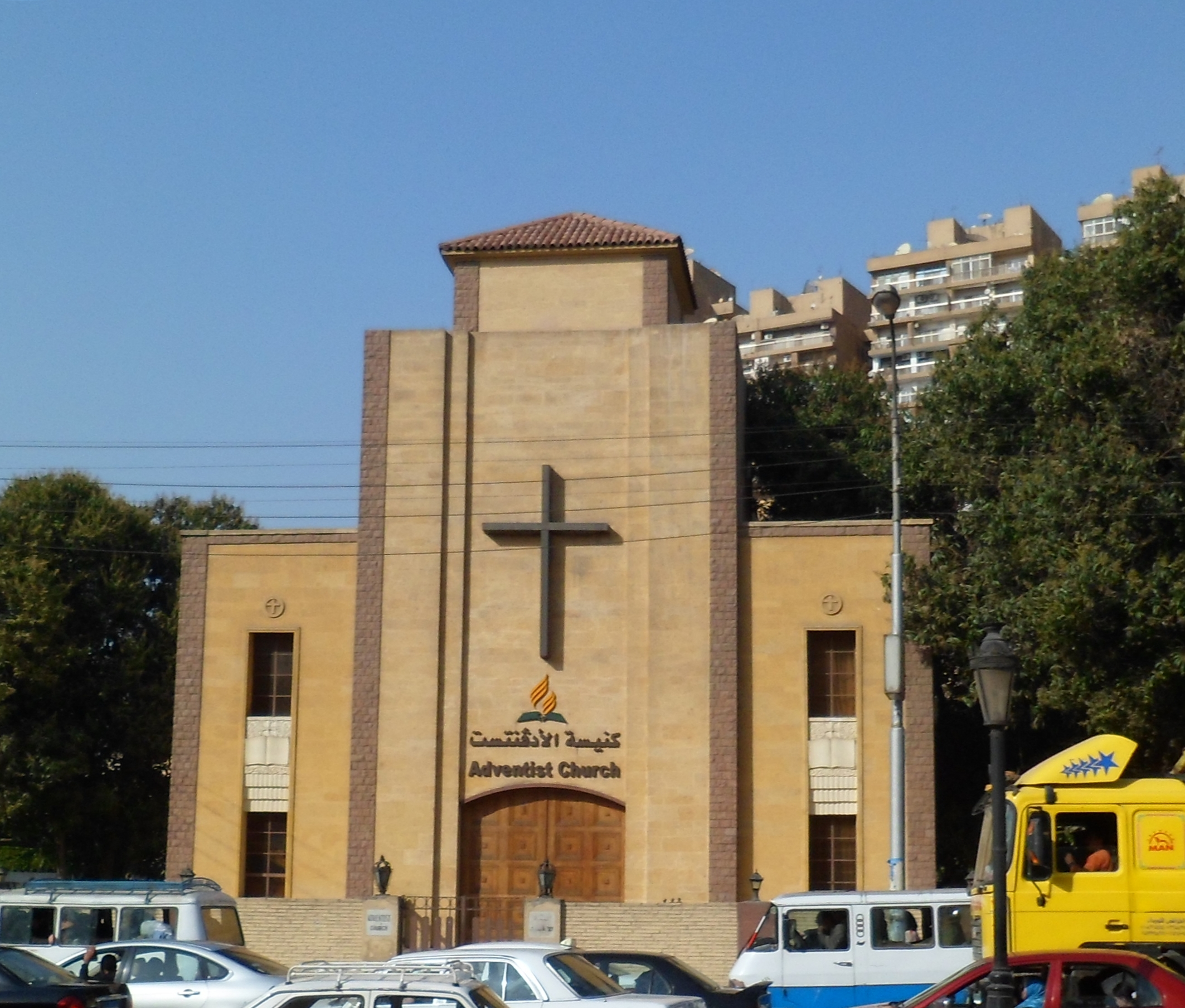 كنيسة الأدفنتست، القاهرة